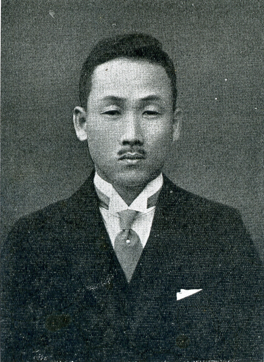 林譲治